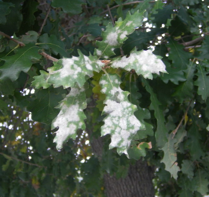 Foglie di quercia infette da Microsphaera alphitoides.